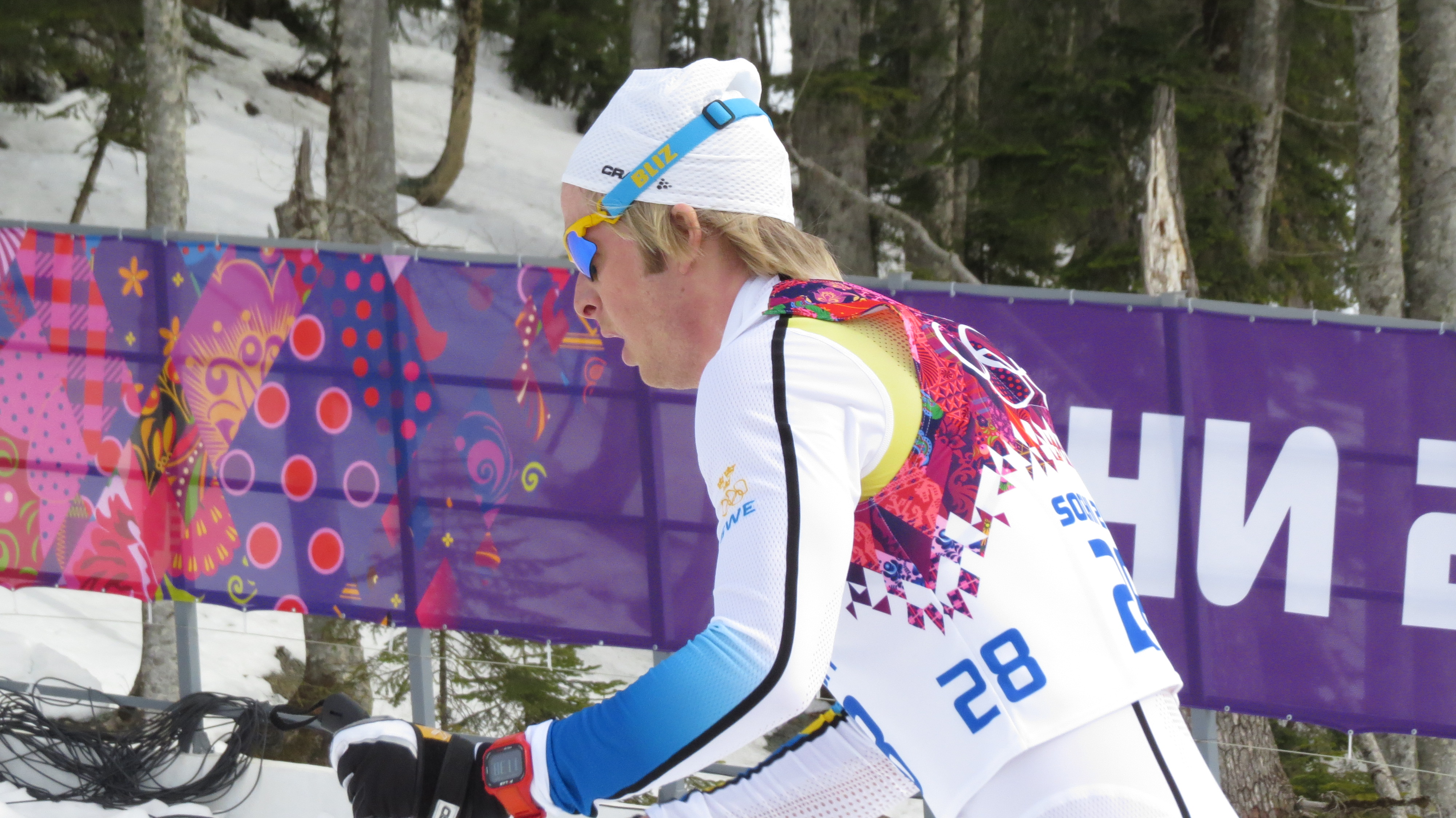 Лыжные гонки на зимних Олимпийских играх 2014 — 15 км классическим стилем (мужчины)